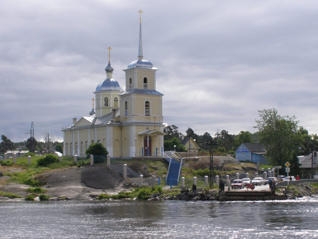 Храм во имя Сретения Господня в Соломенном (Петрозаводск)